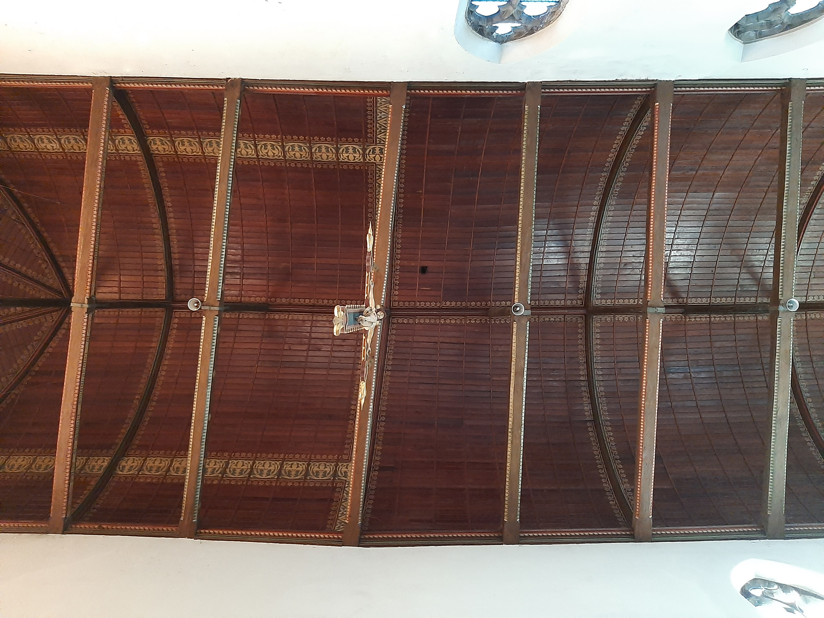 Voûte de la chapelle du Collège Saint-Quirin